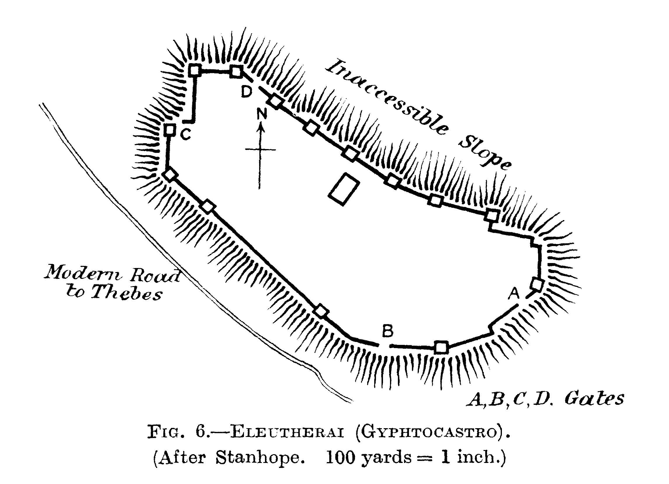 Grundriss der ehemaligen Festung von Eleutherai, Zeichnung nach John Spencer-Stanhope. Die Nord-Richtung ist falsch angegeben. Norden geht längs durch das Garnisonsgbäude im Inneren der Festung. Die Festungsseite mit der Beschriftung "Inaccessible Slope" liegt in Ost-West-Richtung.